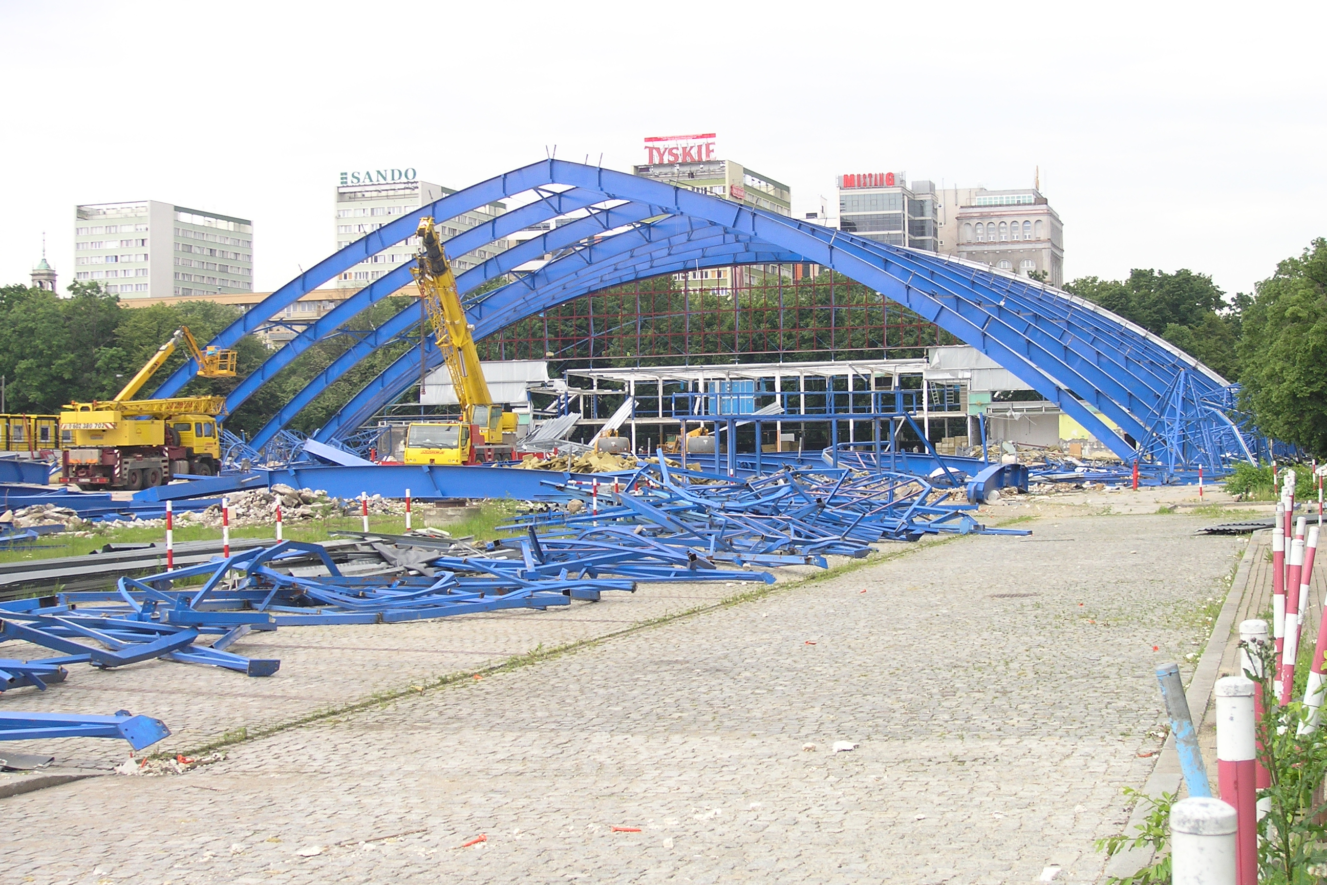 Rozbiórka Kupieckich Domów Towarowych w Warszawie